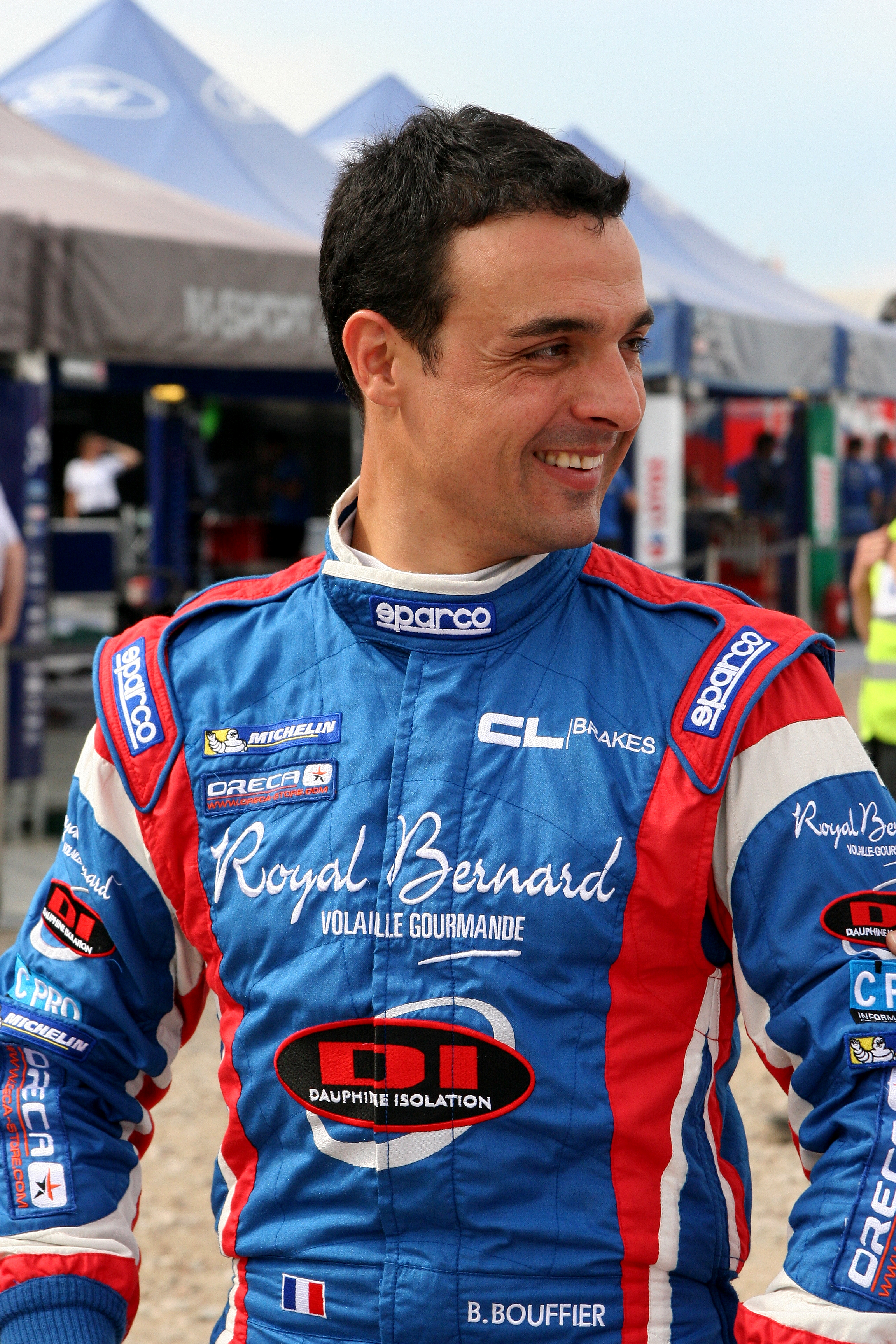 Bryan Bouffier Rally Poland 2014.